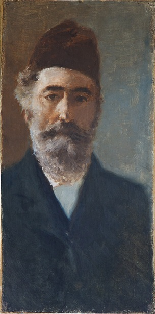 Autorretrato, 1908. Óleo sobre cartón entelado.